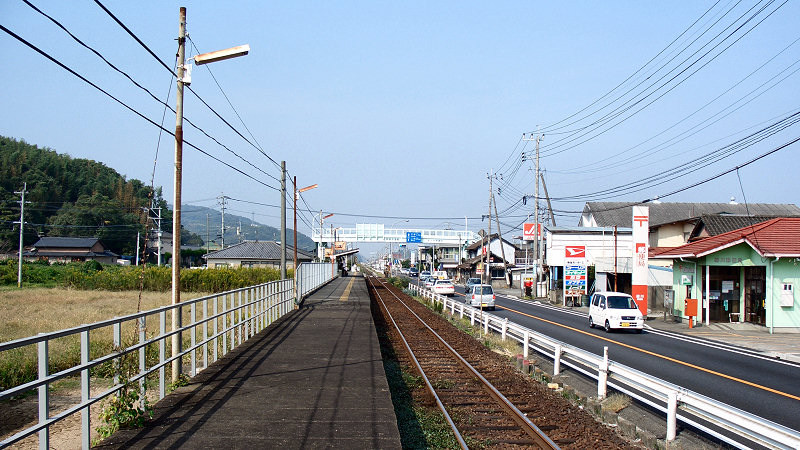 JR三角線緑川駅 ホーム 手前が熊本駅方面 撮影者/著者/著作権保有者 : MK Products (本人がアップロード) 撮影日 : 2006/10/04 緑川駅用にアップロードした画像です。良い画像があれば別の画像に変えてください。